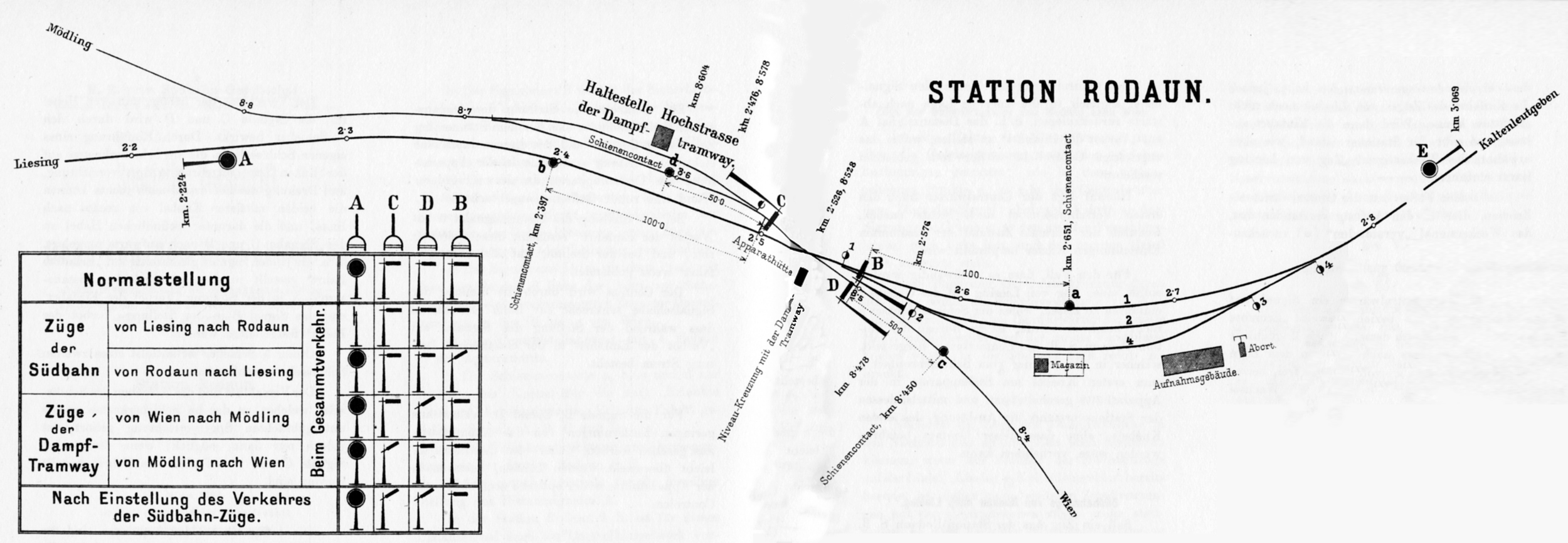 Regelung des Zugverkehrs in der Station Rodaun (damals existierte der Gleisanschluss des Straßenbahnnetzes noch nicht)